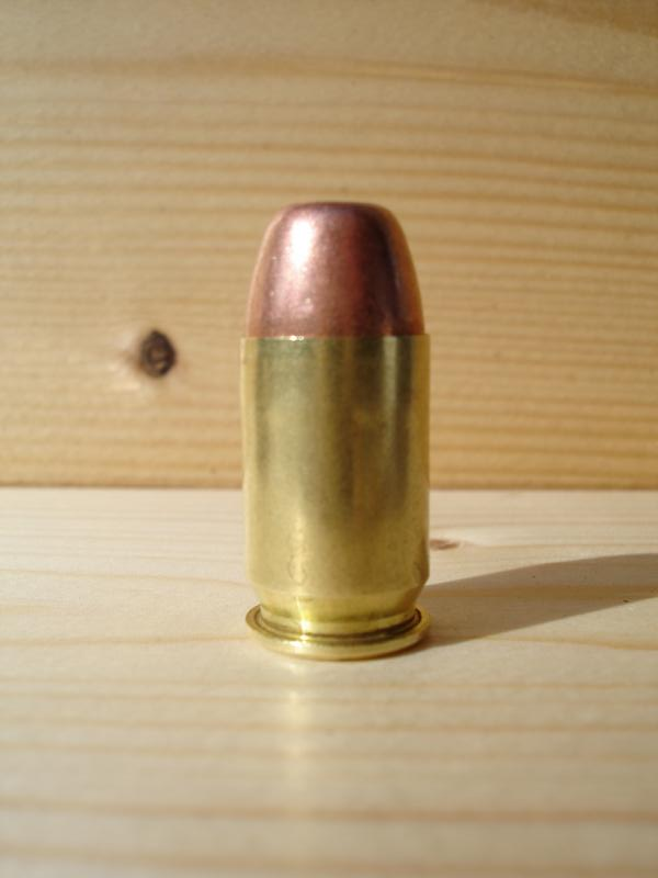 .45GAP